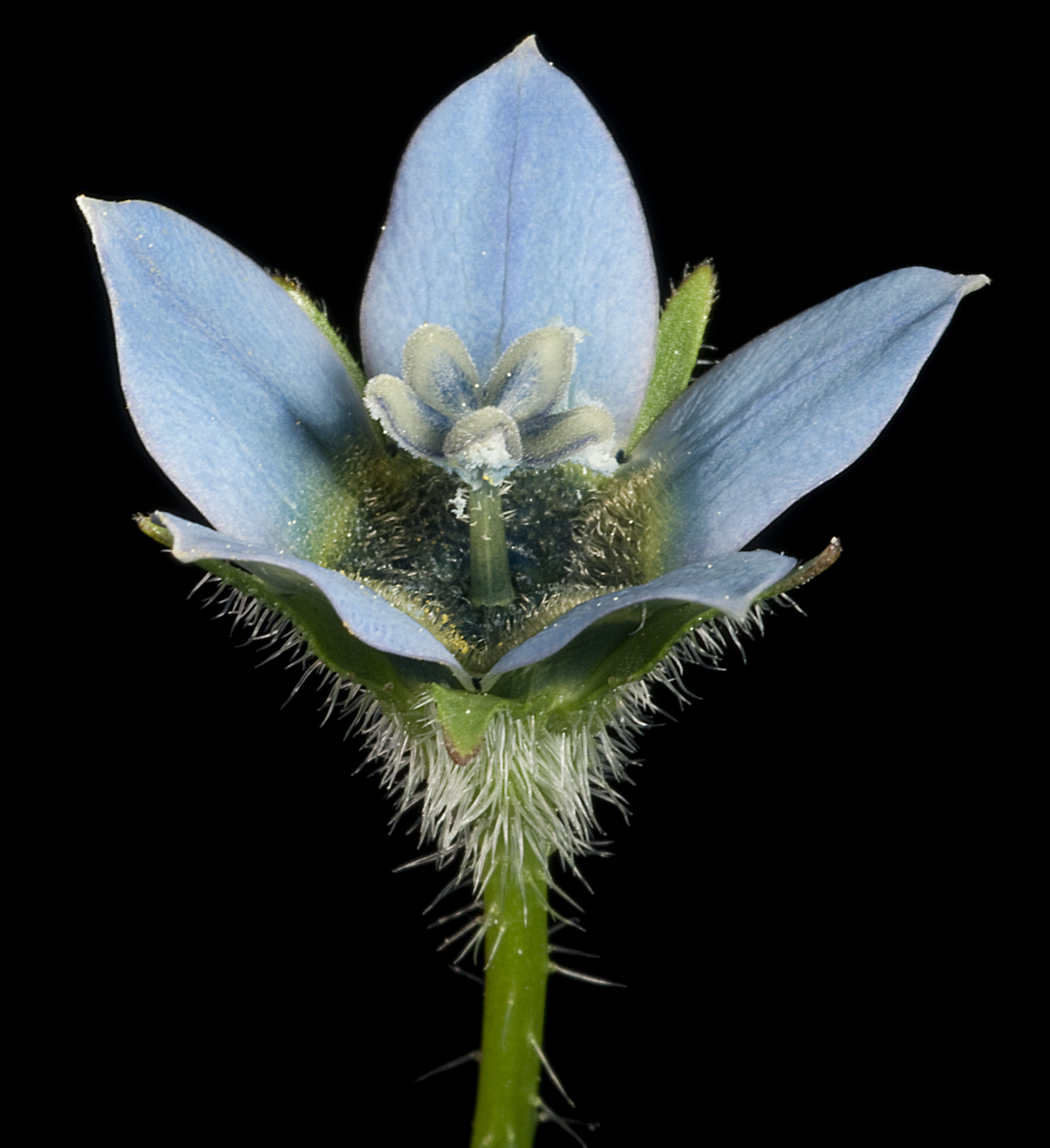 KRT4016